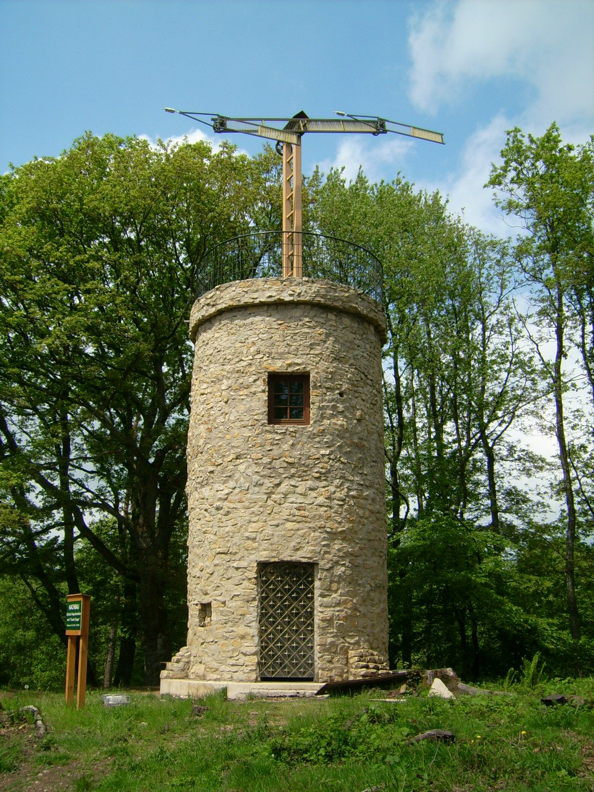 "Optischer Telegraf" (Replikation) von Claude Chappe auf dem "Litermont" bei Nalbach in Deutschland.